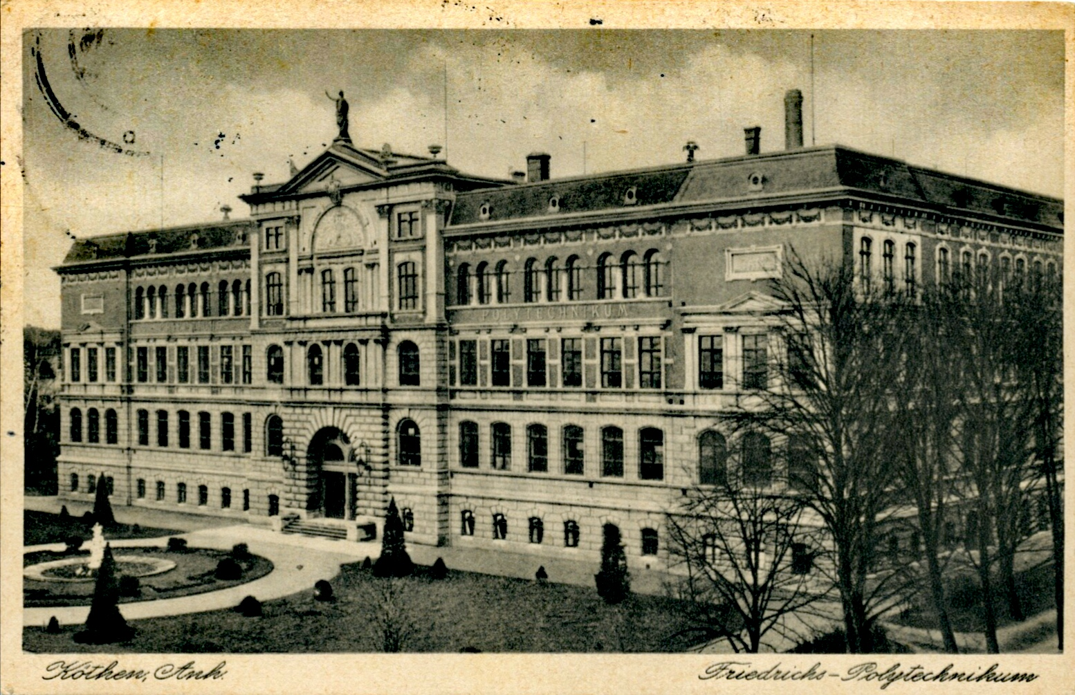 Friedrichs-Polytechnikum Köthen, vor der Umbenennung 1919